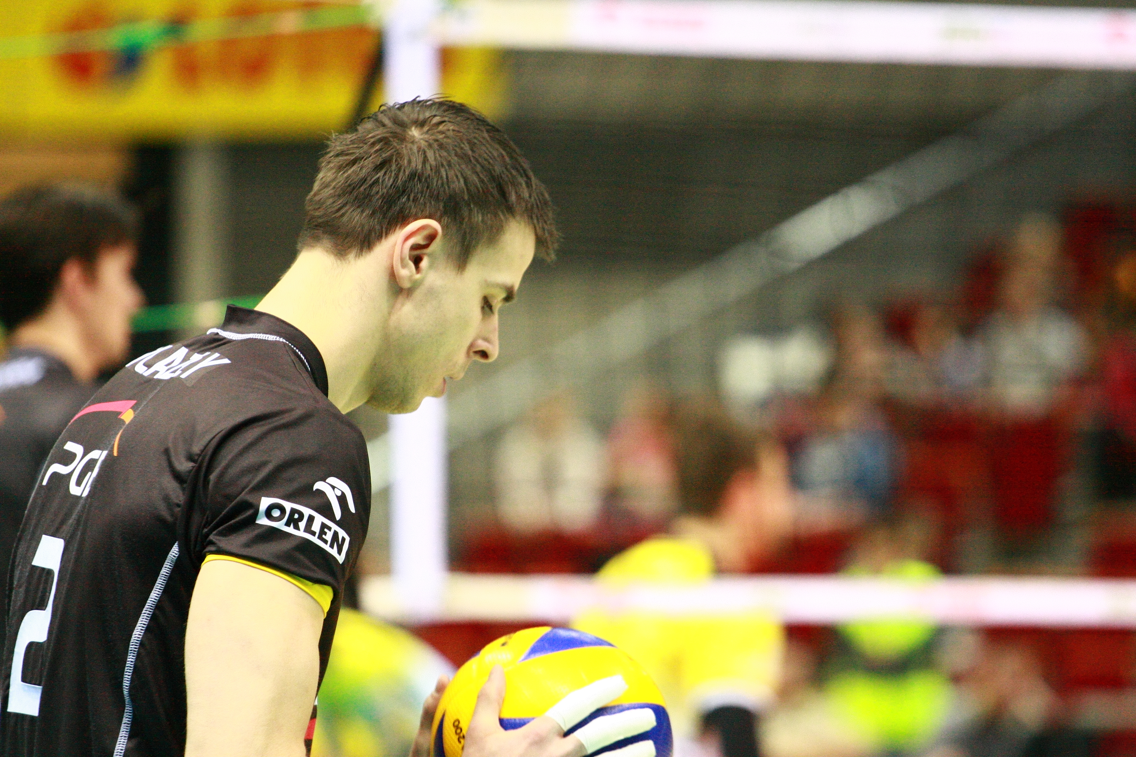 Lotos Trefl Gdańsk vs Skra Bełchatów